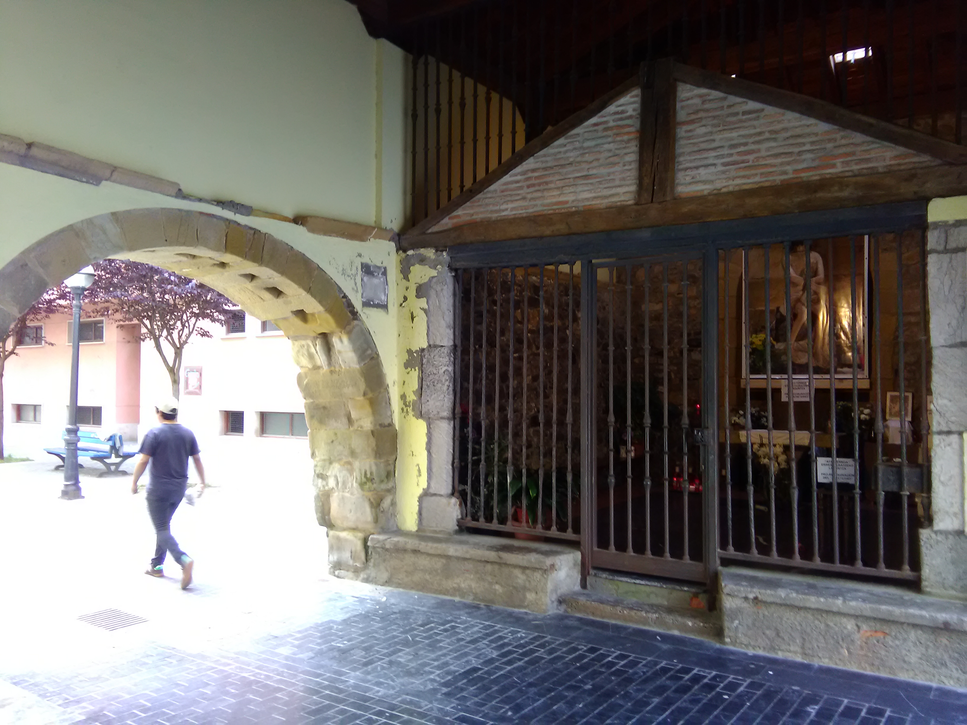 Pietatearen Aitaren kapera (Ondarroa). Beste izenez: Aita Eternoa, Atte Eternu, Aita Piedadekoa, Atte Pirere. XIV gizaldiko eraikina, aintzinan hiribilduaren sarrera nagusia izan zena Gipuzkoa aldetik.